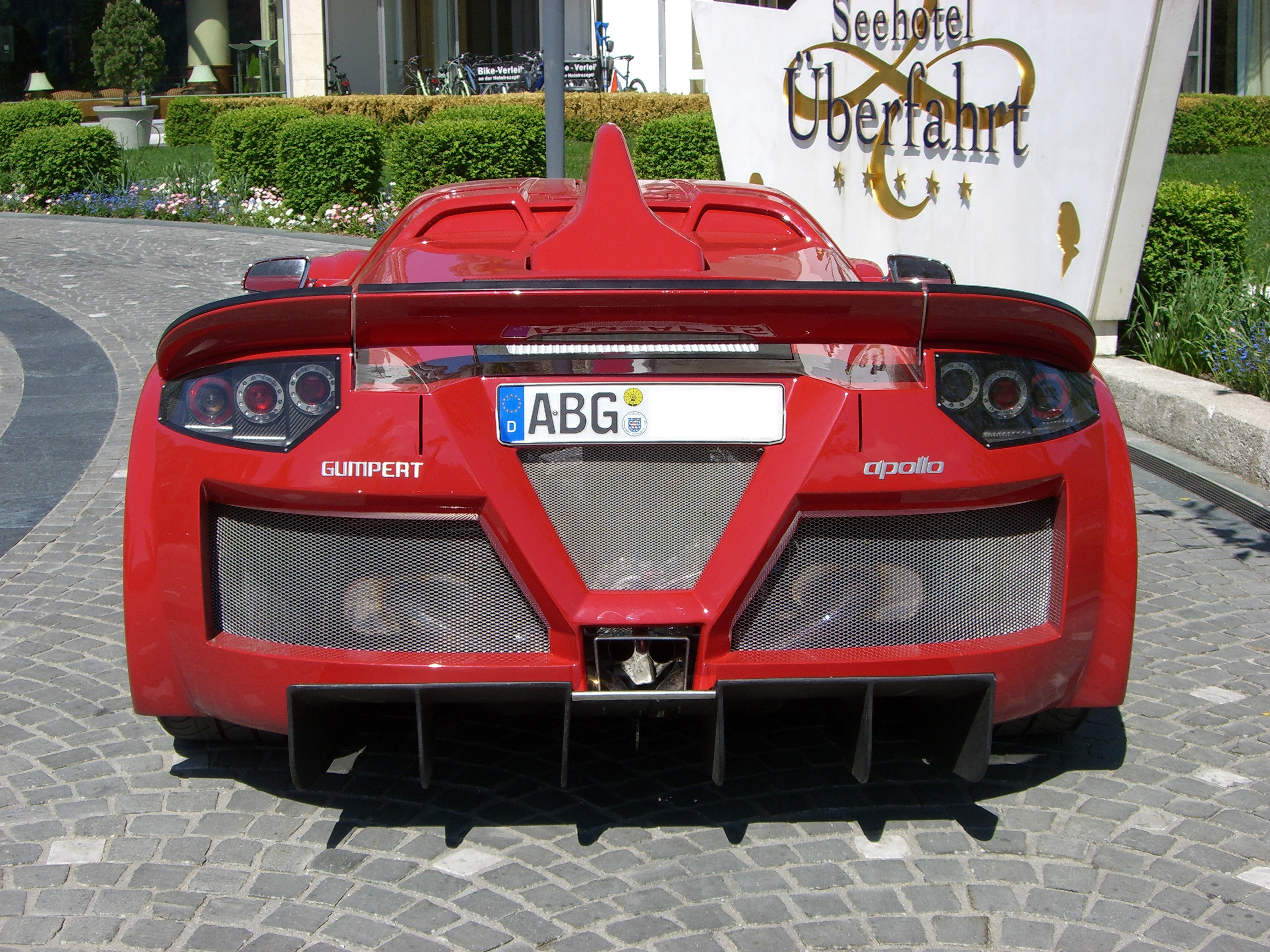 Gumpert Apollo aufgenommen in Rottach-Egern im Mai 2007